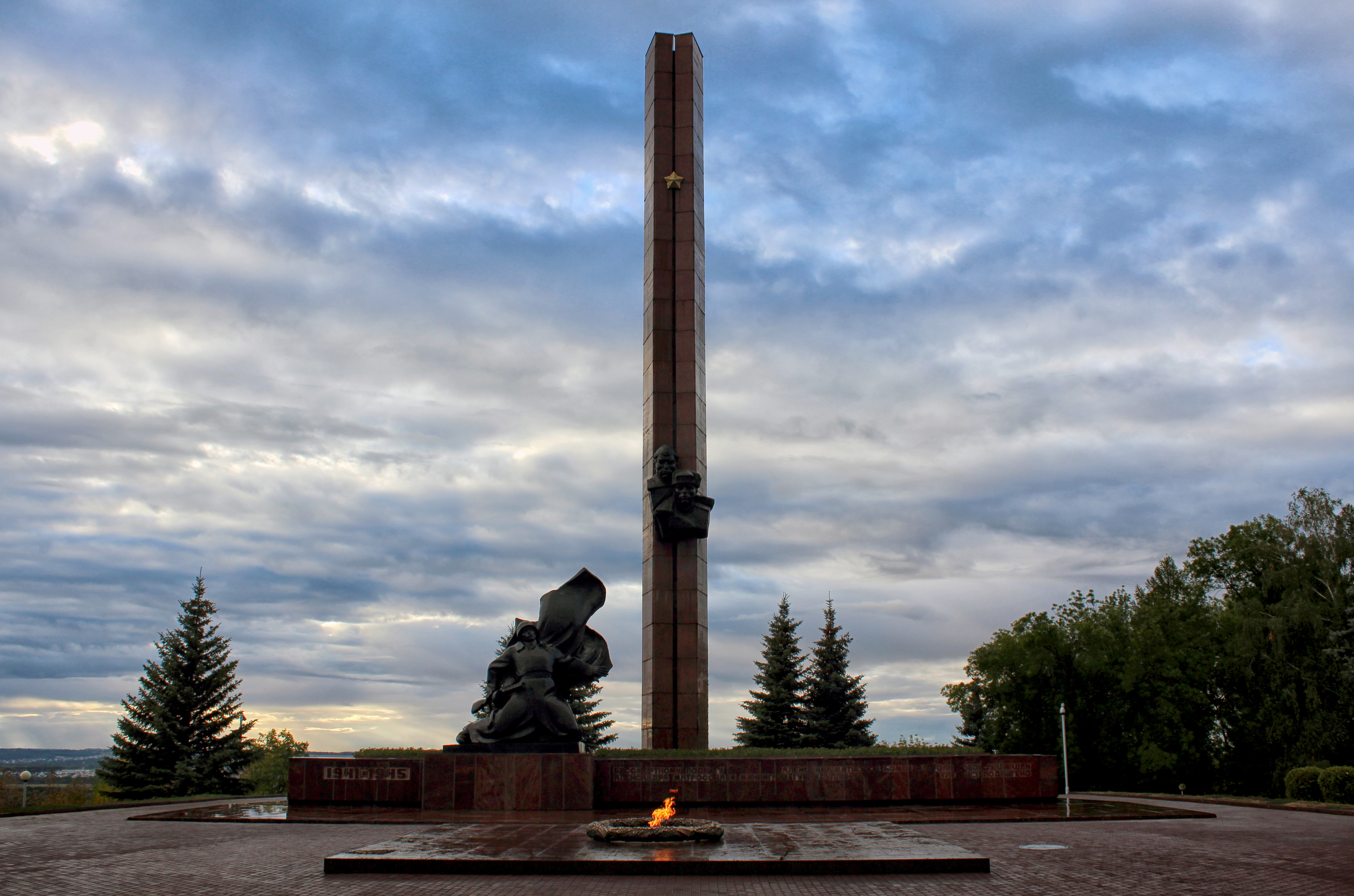 Памятник героям Советского Союза А. Матросову и М. Губайдуллину: парк Победы, Уфа, Башкортостан